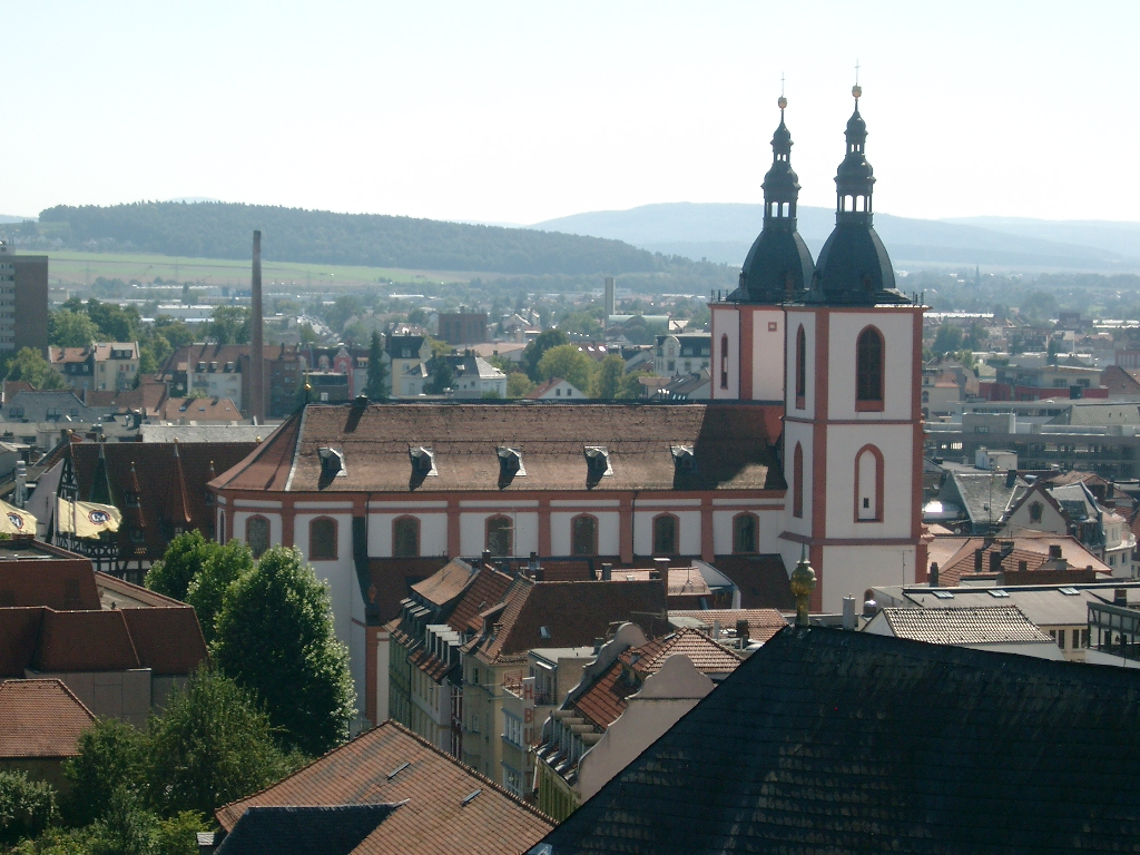 Panorama de la ville de Fulda